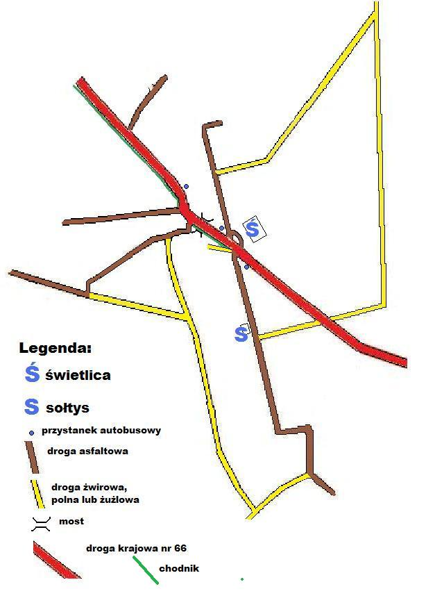 Plan Woli Zambrowskiej wykonany przez Piotra Bączyka, twórcę strony internetowej Woli Zambrowskiej. Wersja specjalna dla Wikipedii.